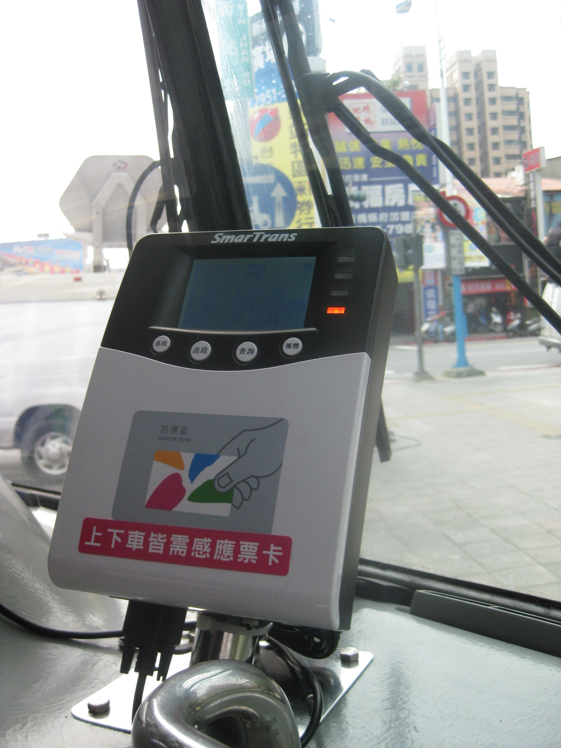 中文（台灣）: 台北縣公車系統Bân-lâm-gú: Tâi-pak-kuān kong-tshia hē-thóng. 臺北縣公車系統。